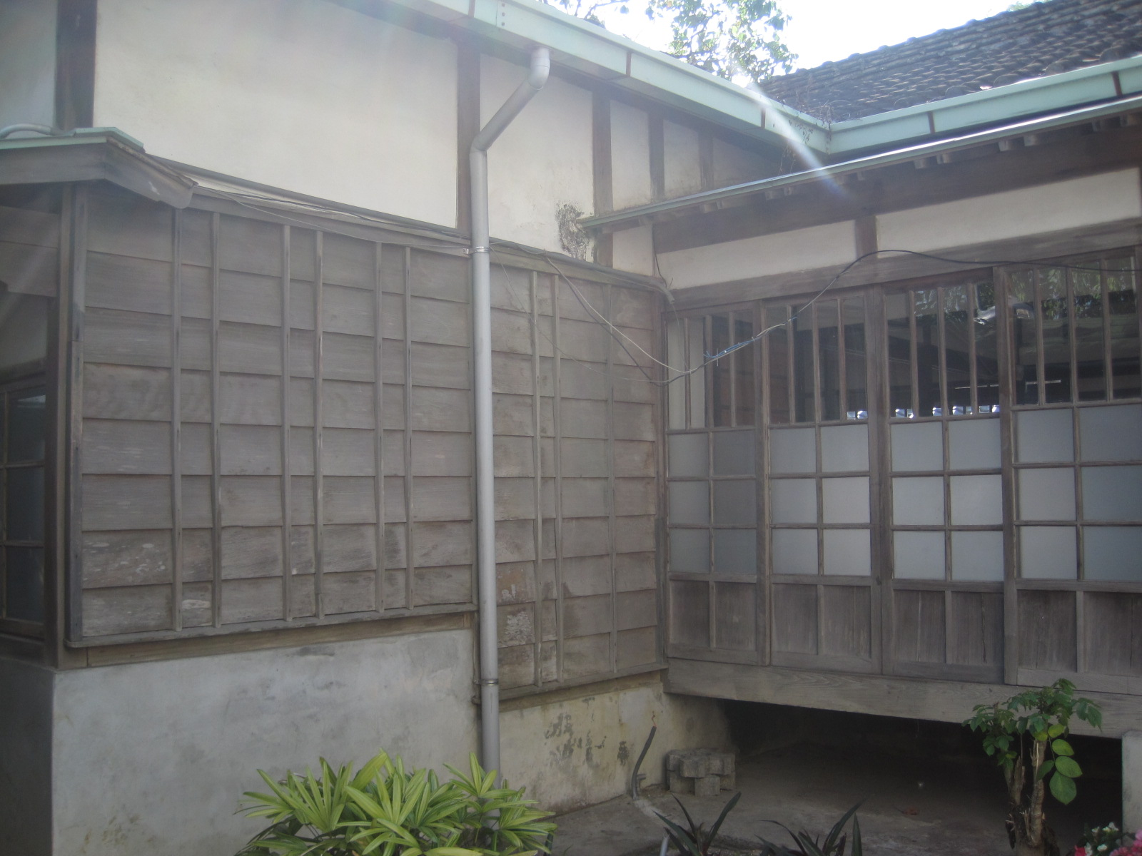 中文（台灣）: 旗山武德殿附屬建築